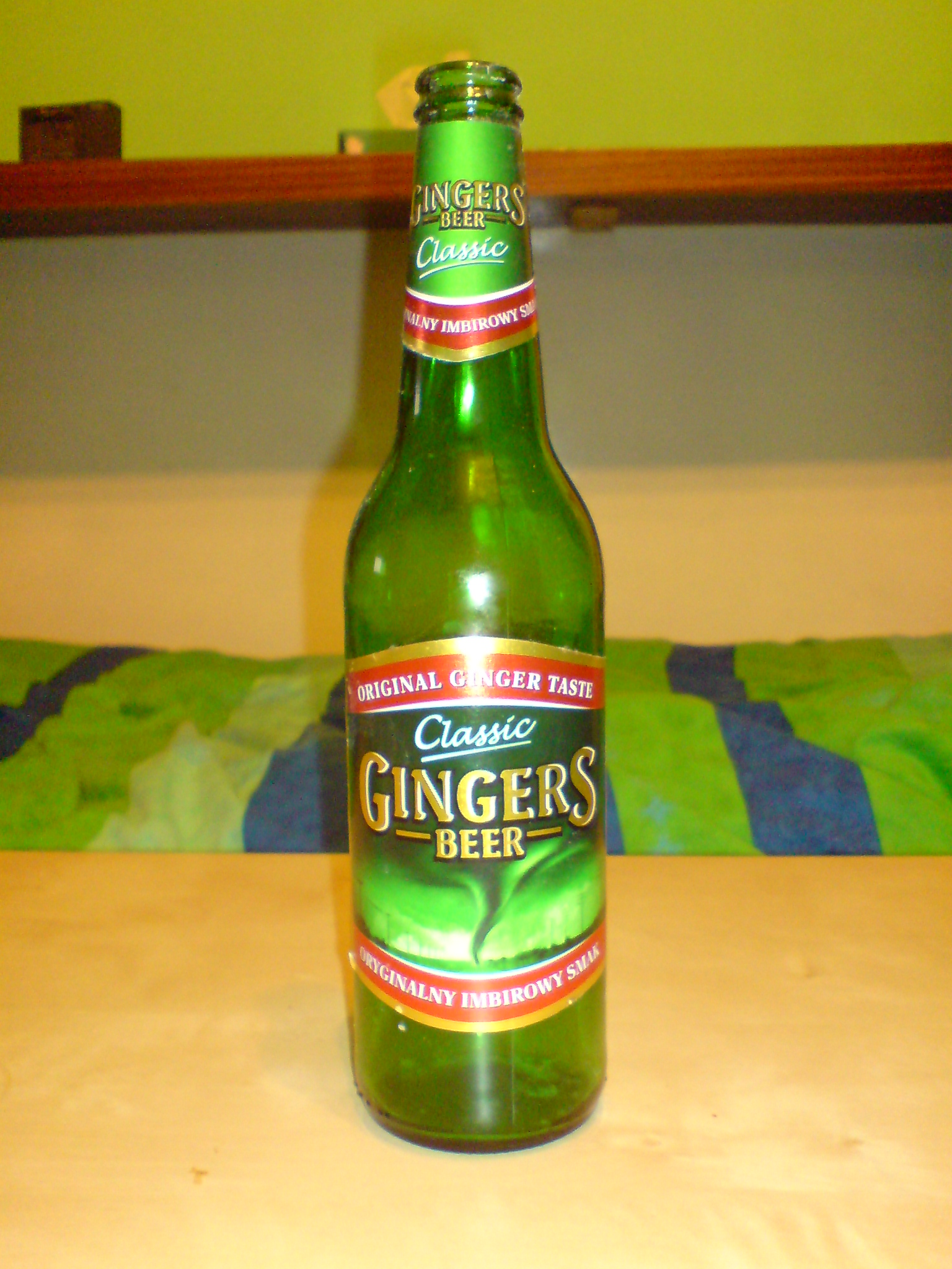 Butelka piwa marki Gingers